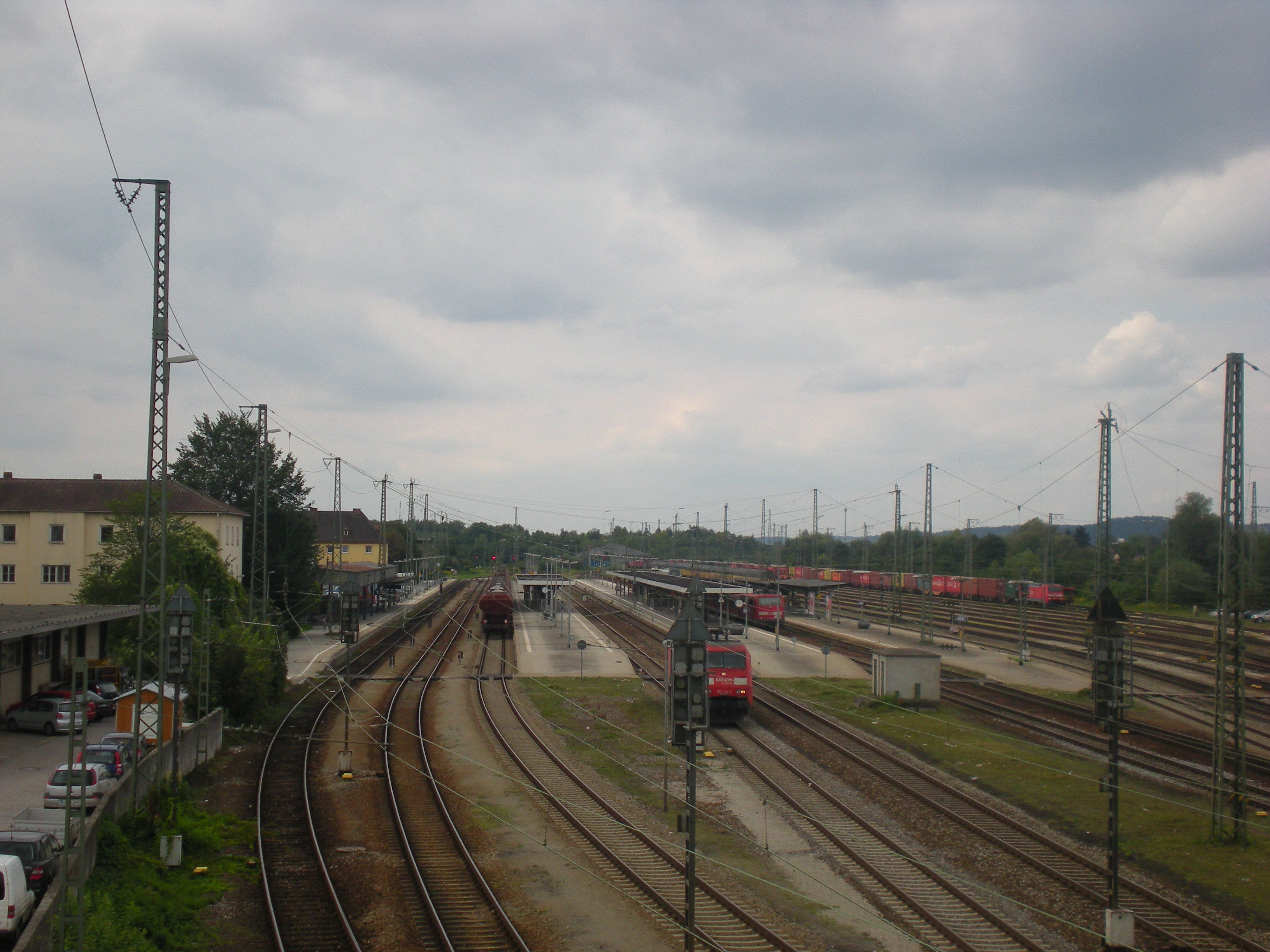 Gleise und Bahnsteige des Landshuter Hauptbahnhofs